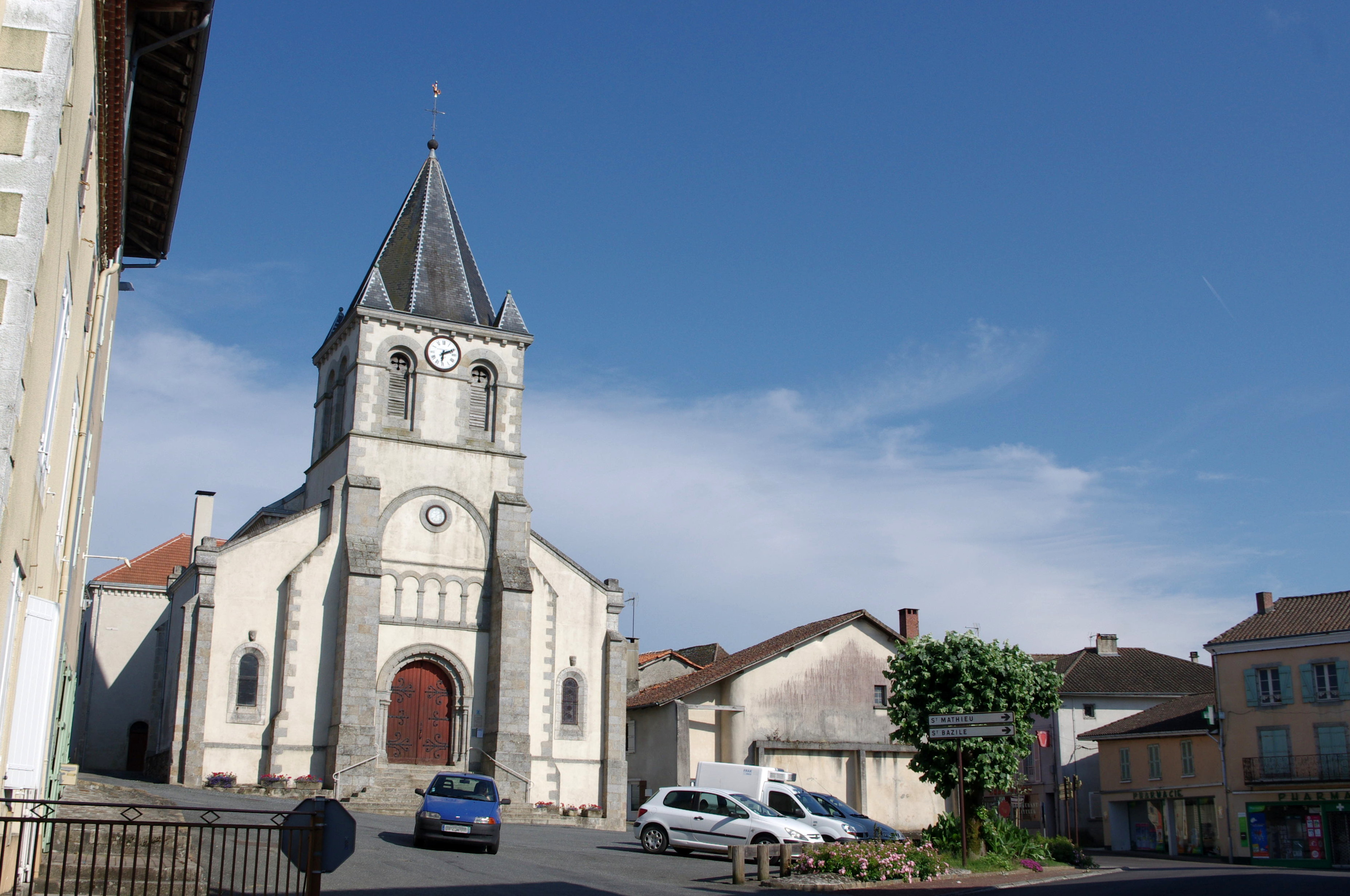 L'église de Oradour sur Vayre, Haute Vienne, France.